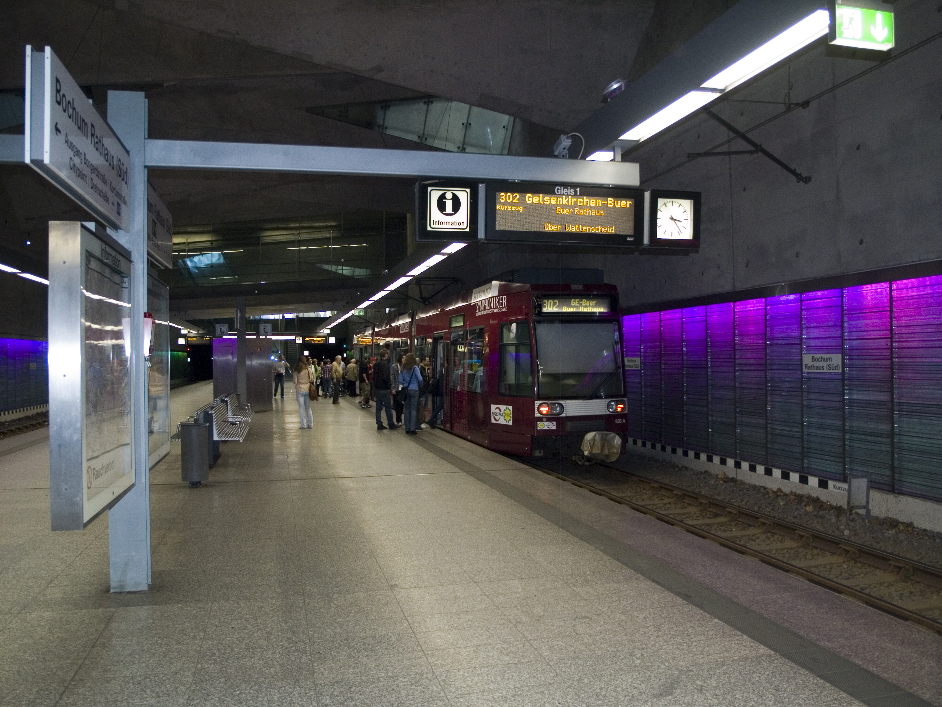 Северный рейн - Вестфалия. Бохумский скоростной трамвай - станция Rathaus Station-Sud